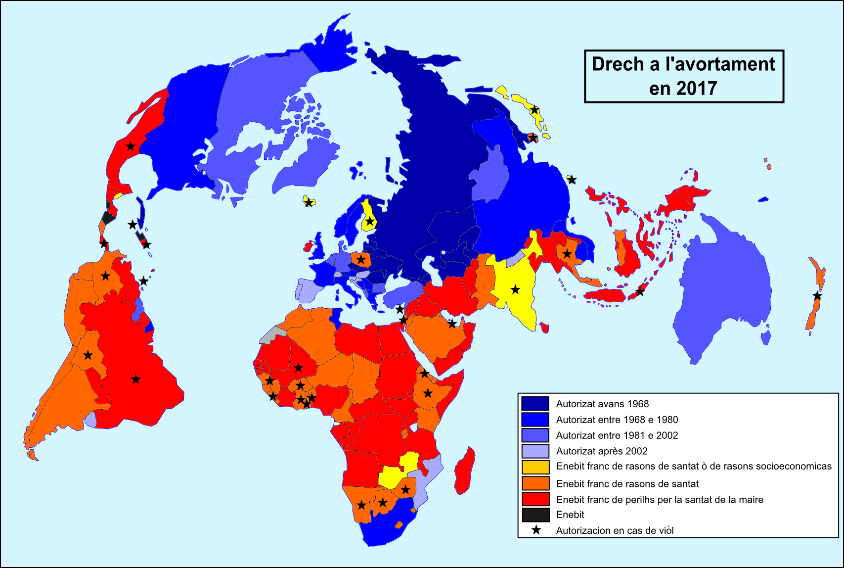 Drech a l'avortament en 2017.